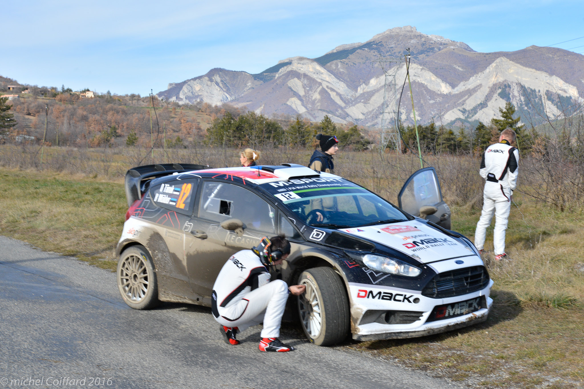 Rajd Monte Carlo 2016 - Ott Tänak